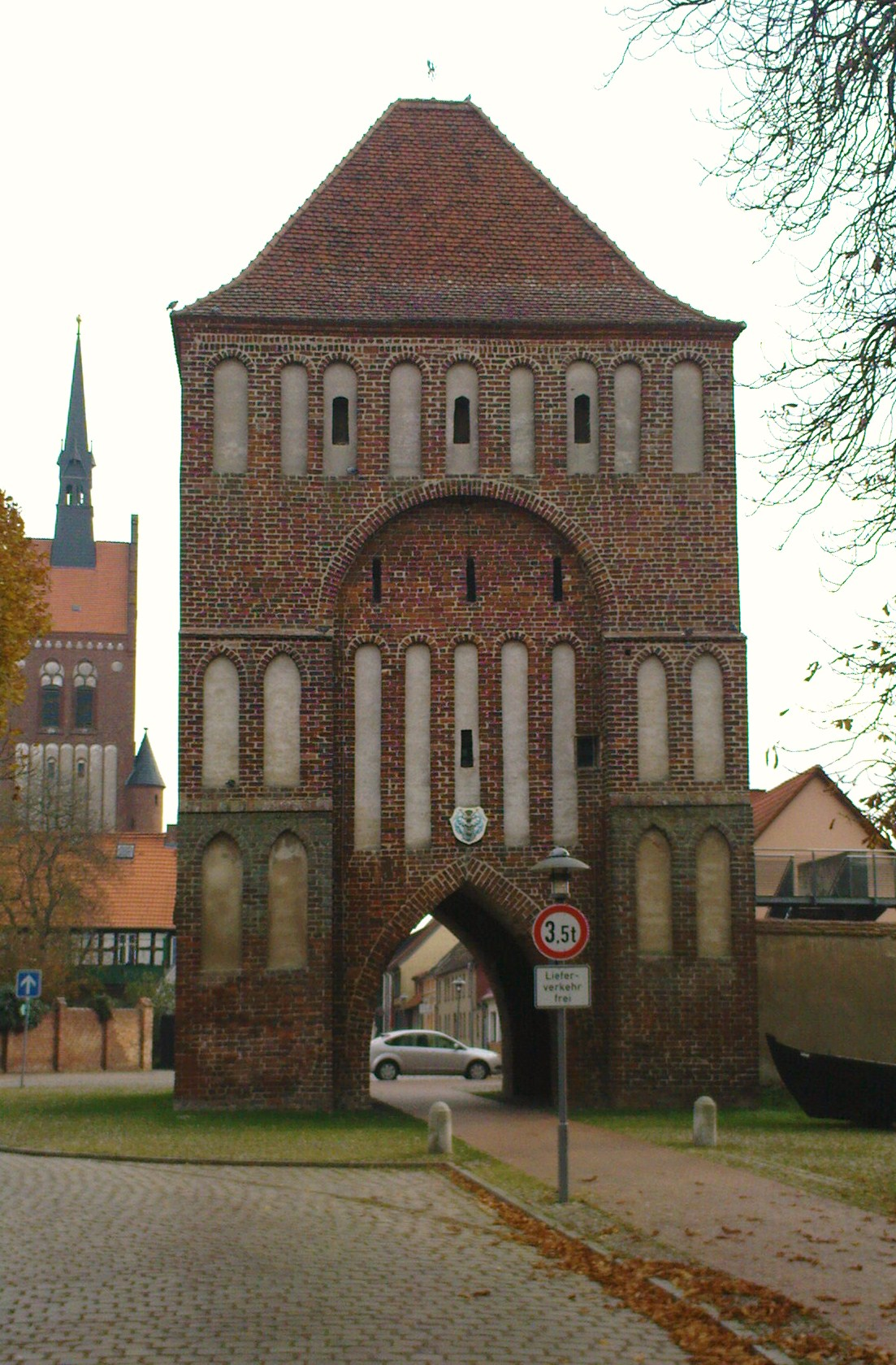 Feldseite des Anklamer Tores in Usedom